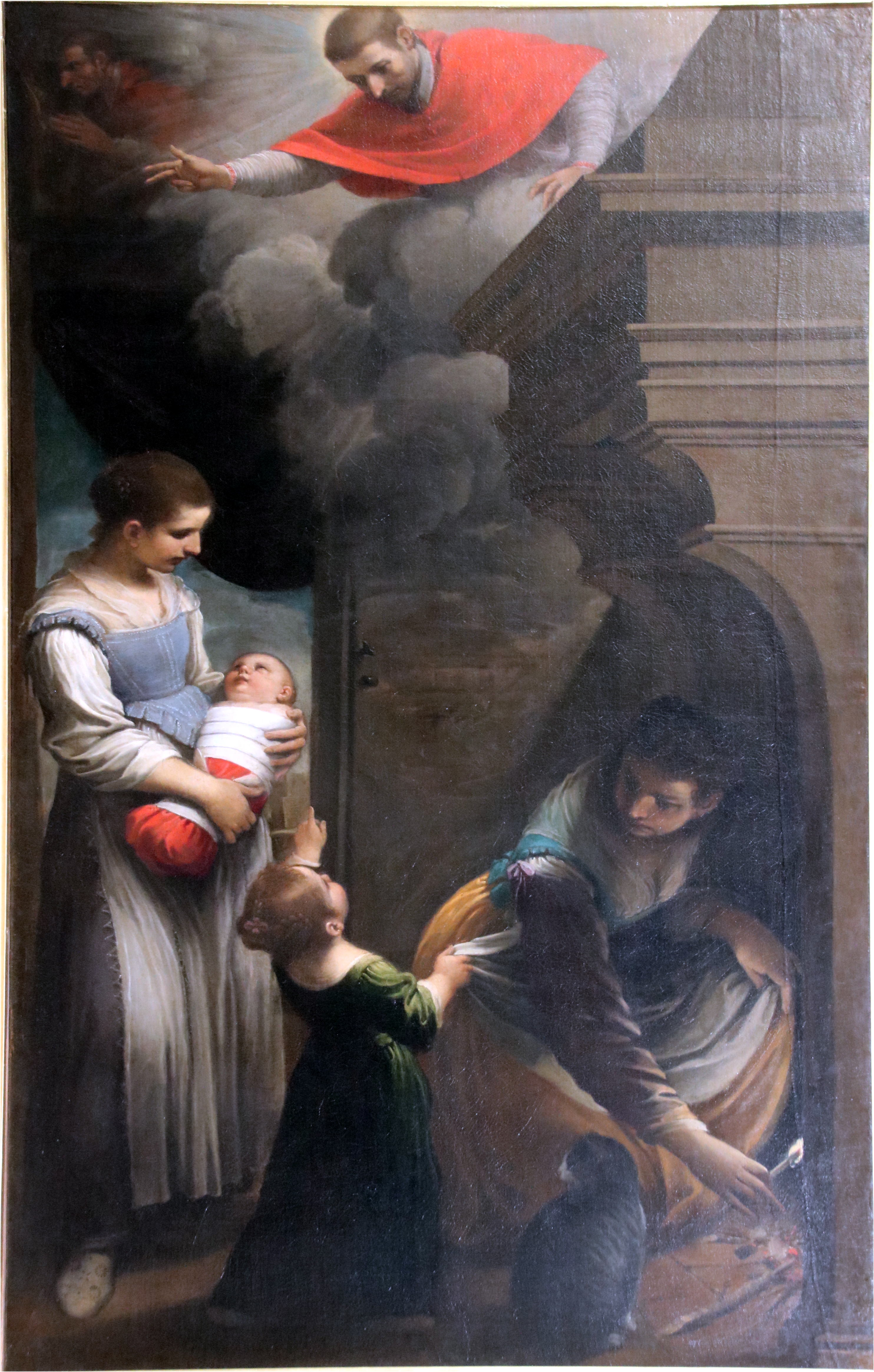 Giovanni Francesco Barbieri detto il Guercino, Un miracolo di San Carlo Borromeo, 1613-1614 circa, Renazzo, Chiesa di San Sebastiano